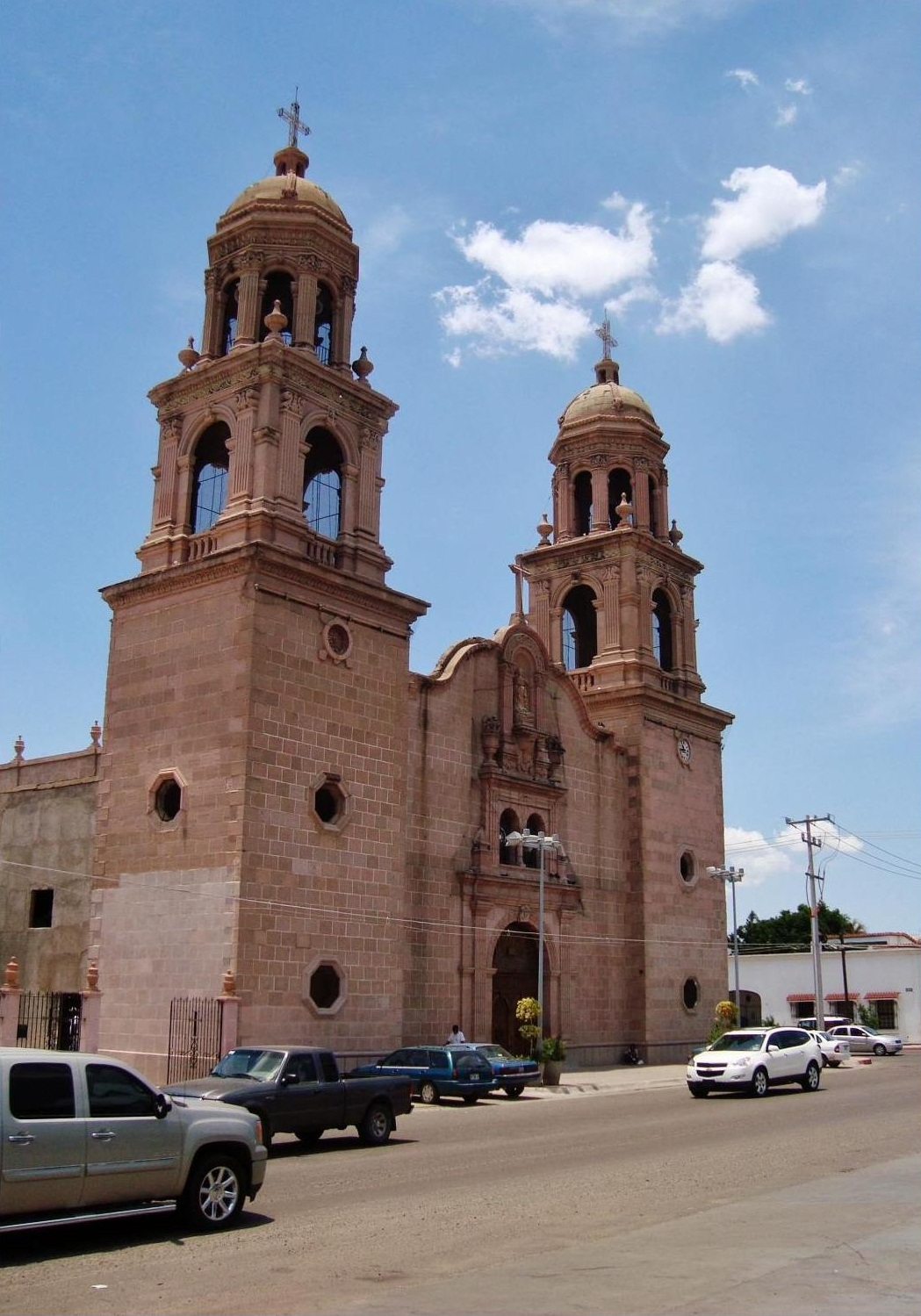 Parroquia del Sagrado Corazón de Jesús, Navojoa, Sonora, México